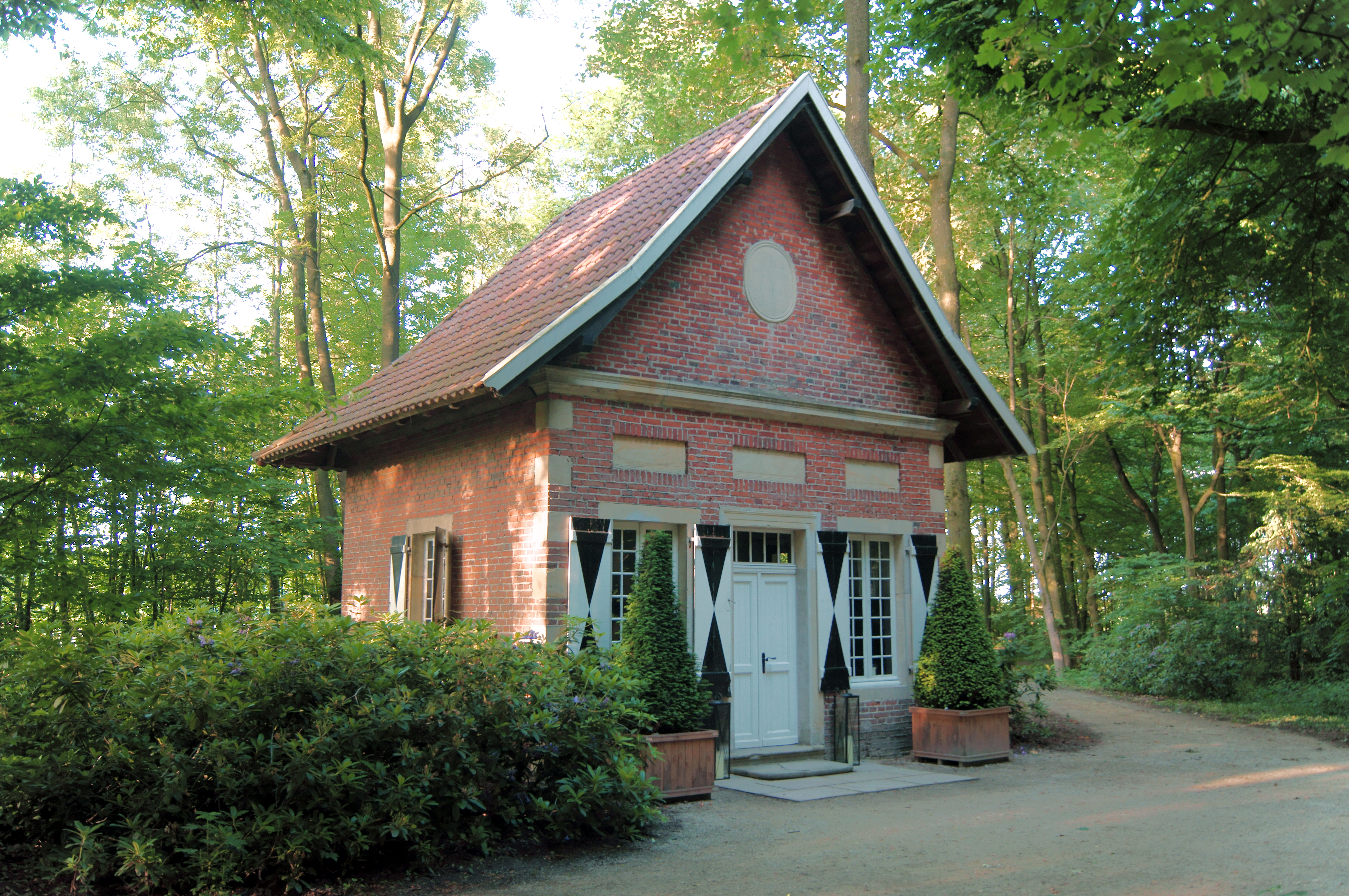 Das abgebildete Teehaus befindet sich im an die Gartenanlage anschließenden Wald, der zum Gelände der Burg Hülshoff bei Havixbeck zählt. Burg Hülshoff ist das Geburtshaus von Deutschland bedeutendster Dichterin Annette von Droste-Hülshoff. This is a photograph of an architectural monument.